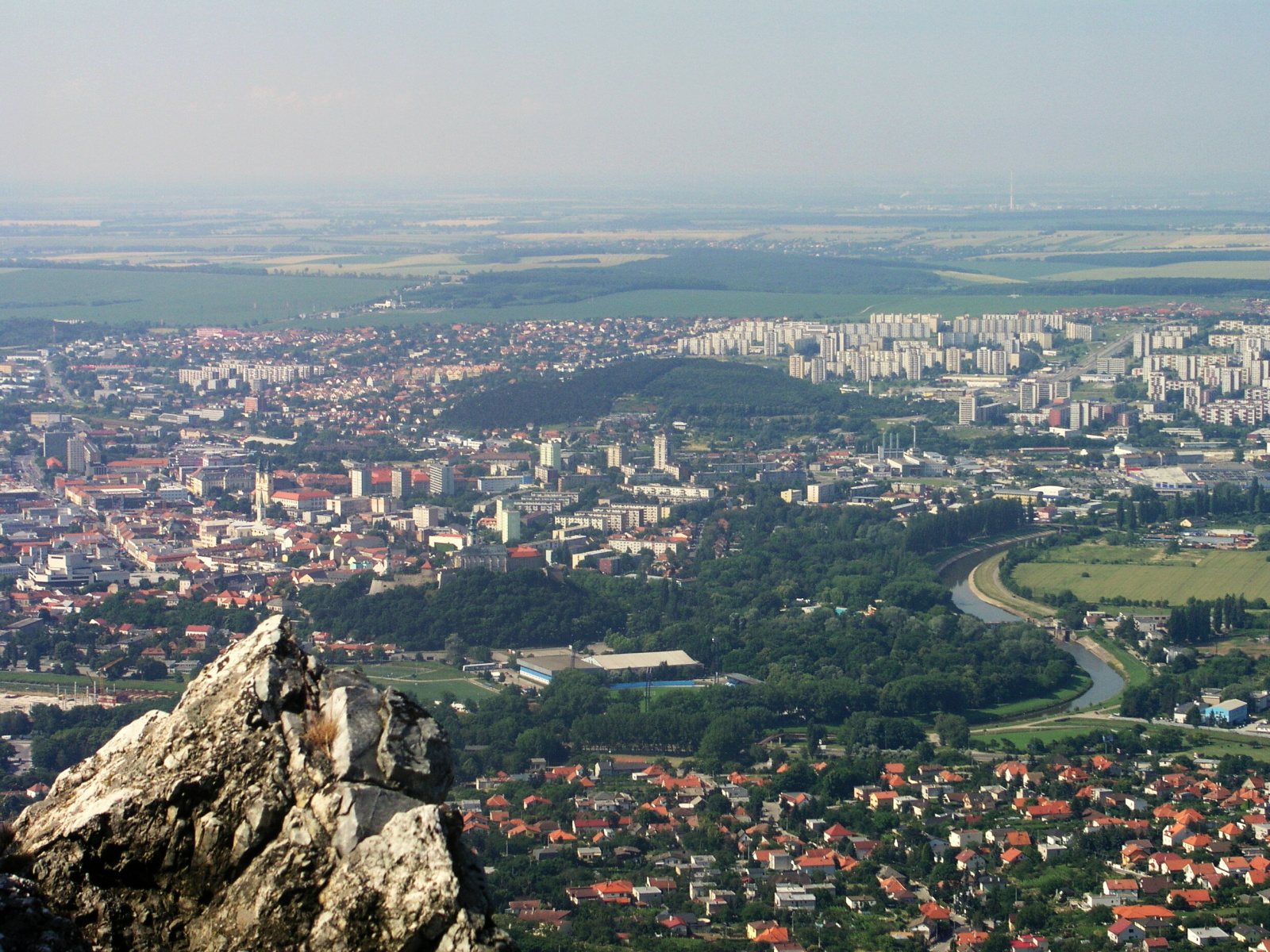 Mesto Nitra z vrchu Zobor.